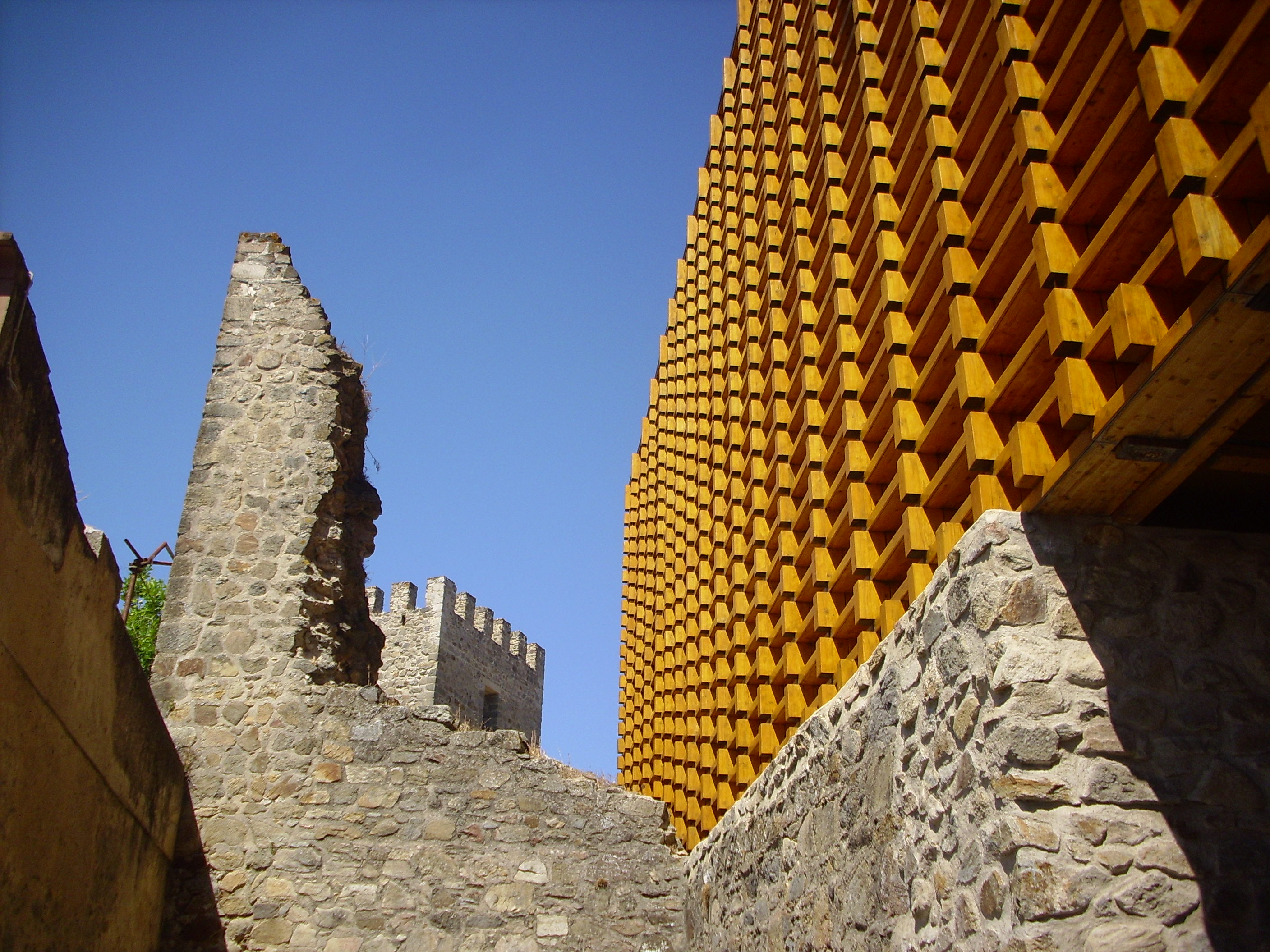 Portalegre